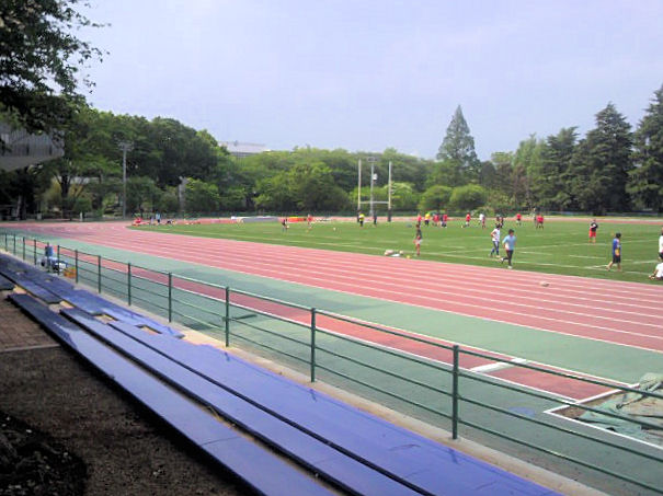 成蹊大学けやきグラウンド（400ｍ競技場・ラグビー場）